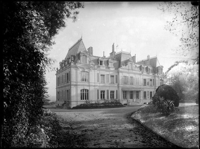 Prise de vue du château Mousseau à Évry (Essonne) au XIXe siècle, détruit aujourd'hui